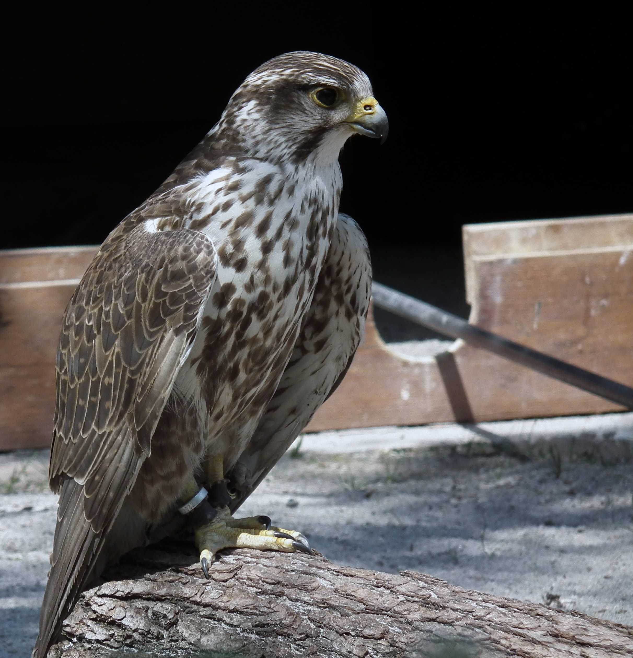 Sakerfalke (Falco cherrug) im Wildpark Tripstrill (Baden-Württemberg, Deutschland)